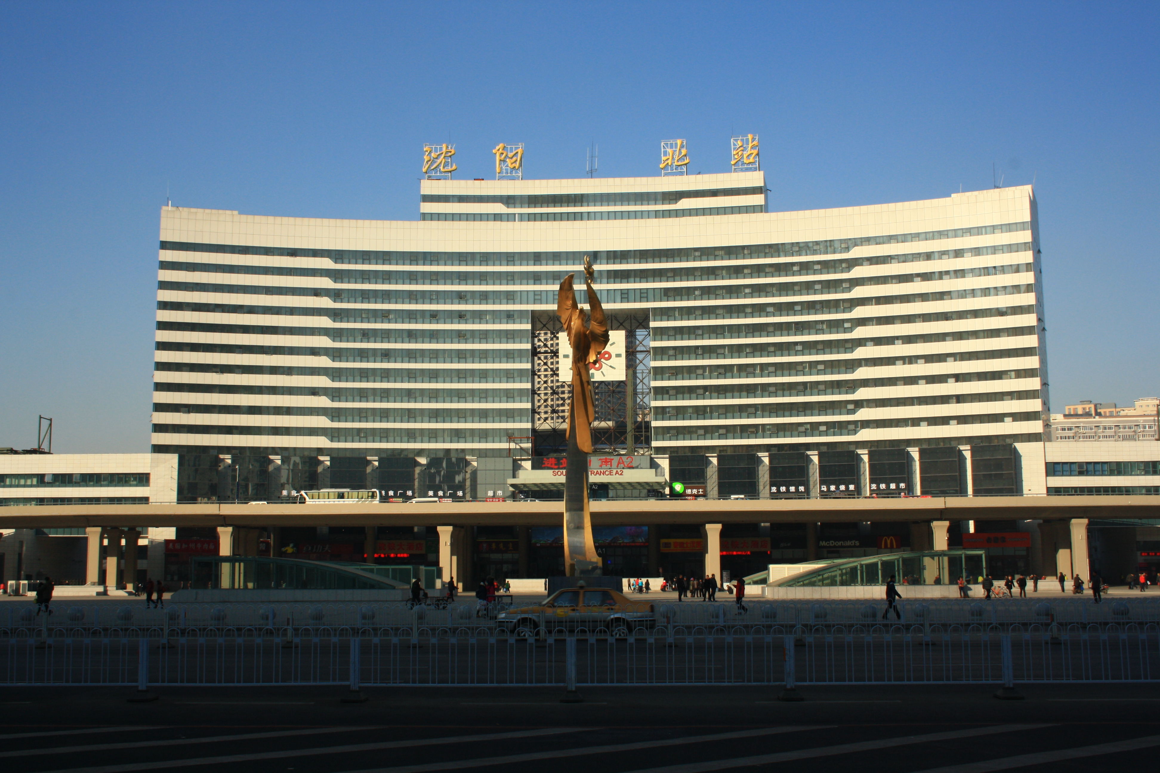 中文（中国大陆）: 沈阳北站南广场逐日雕塑